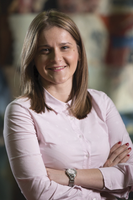 Српски (ћирилица): др Цвјетана Цвјетковић Иветић